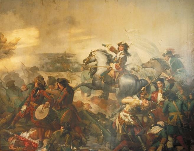 Claude Louis Hector de Villars lidera las tropas francesas contra los austro-holandeses del príncipe Eugenio de Saboya en la batalla de Denain, episodio de la Guerra de Sucesión Española que le permitió a los franceses negociar una paz favorable a pesar de la serie de derrotas que habían sufrido anteriormente